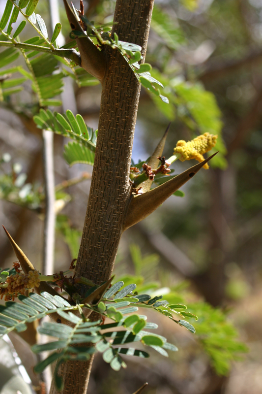 Vachellia collinsii (formerly Acacia collinsii) in Guanacaste, Costa Rica.